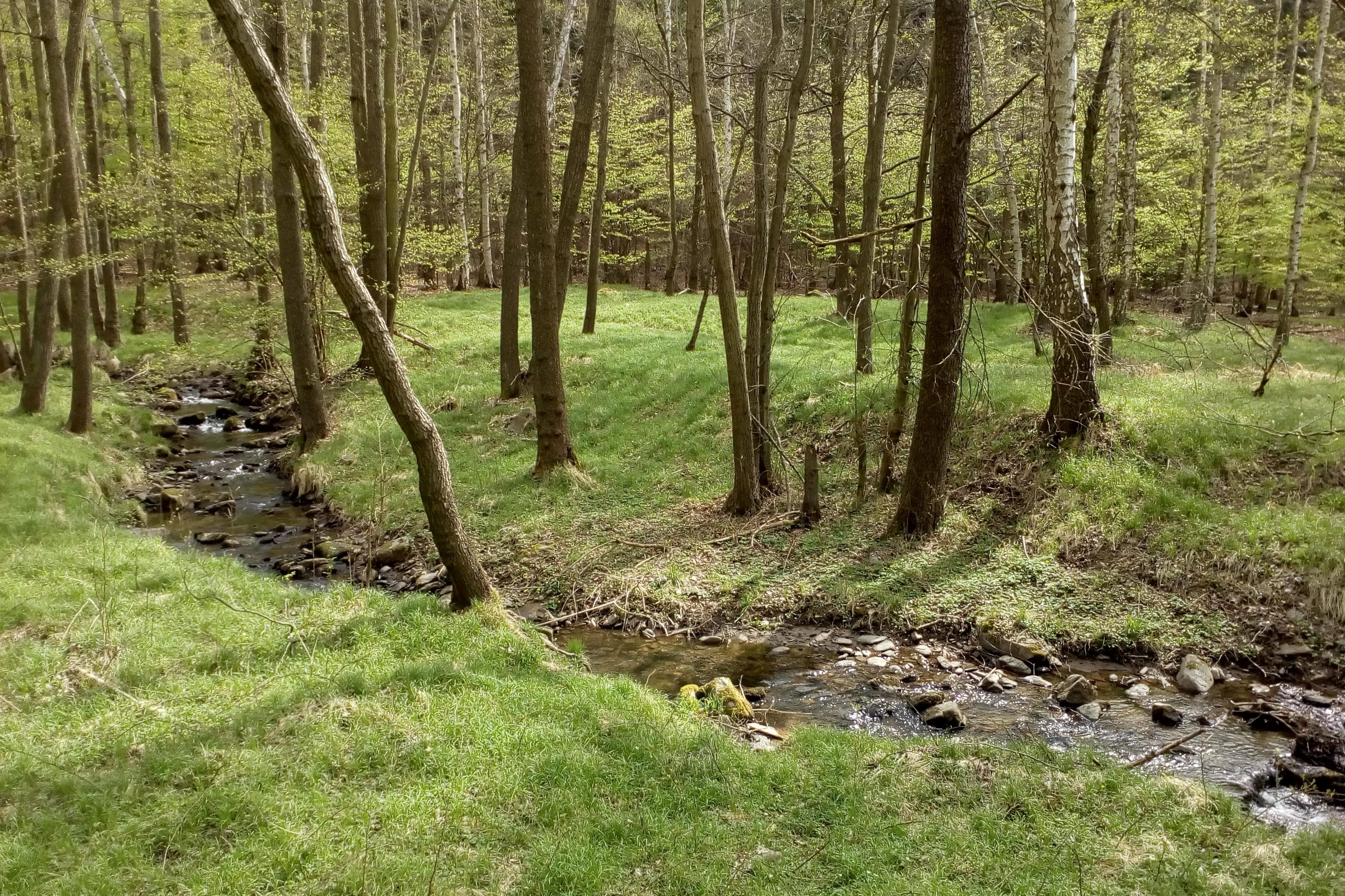 Potok Hutná v údolí nad Málkovem v katastrálním území Černovice u Chomutova